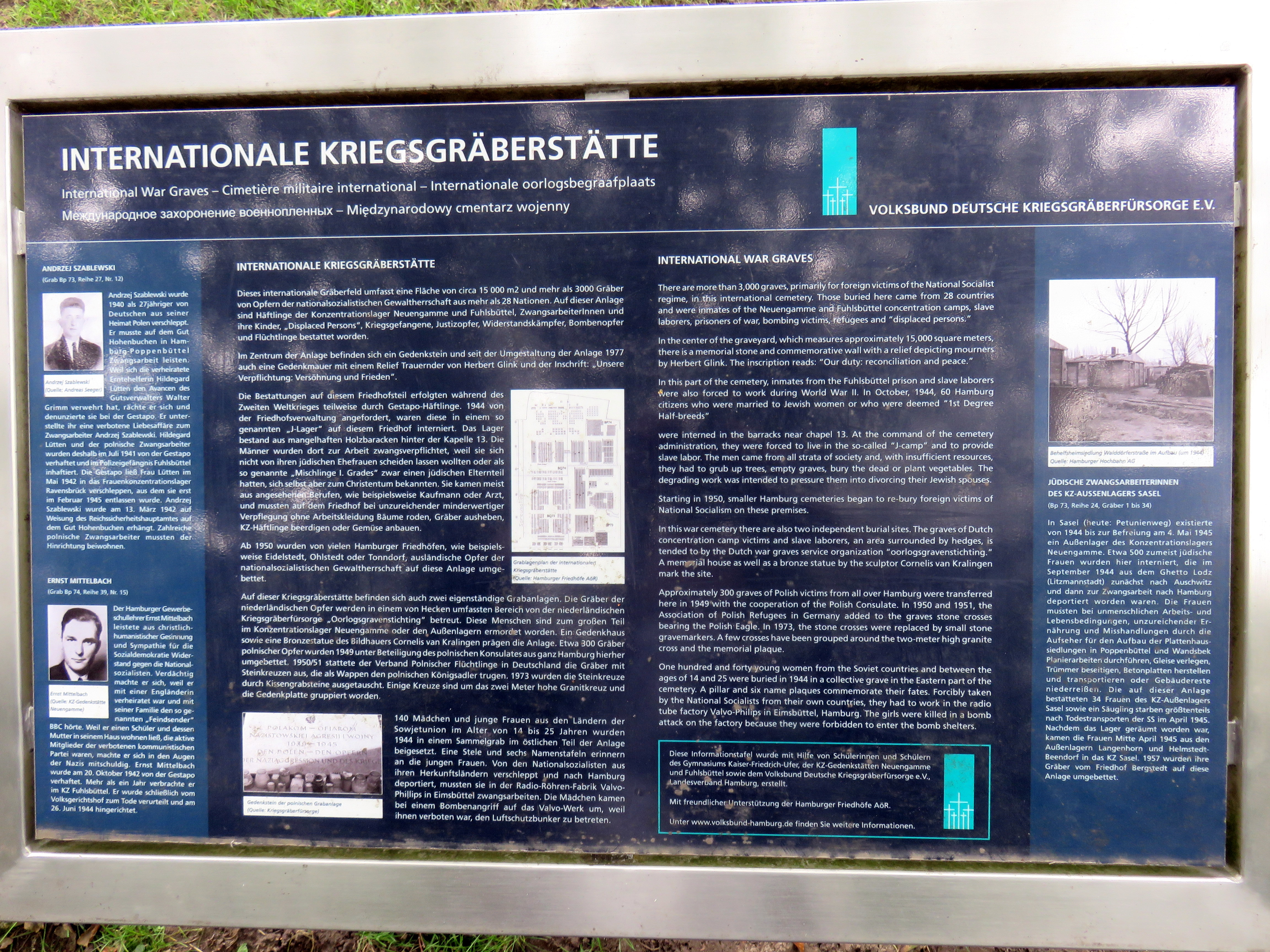 Gräberfeld von etwa 3500 Nazi-Opfern aus 28 Nationen, Friedhof Ohlsdorf, Planquadrat BP 73 – 74 / Bo 74 (beim Eingang Sorbusallee). Das Relief an der Gedenkmauer wurde 1977 vom deutschen Künstler Herbert Glink geschaffen.